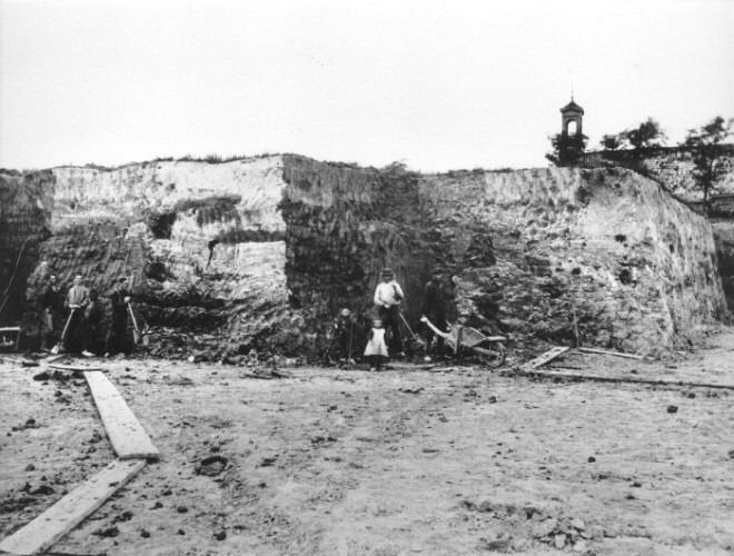 Reproductie van een foto van de afgraving van de terp van Aalsum.